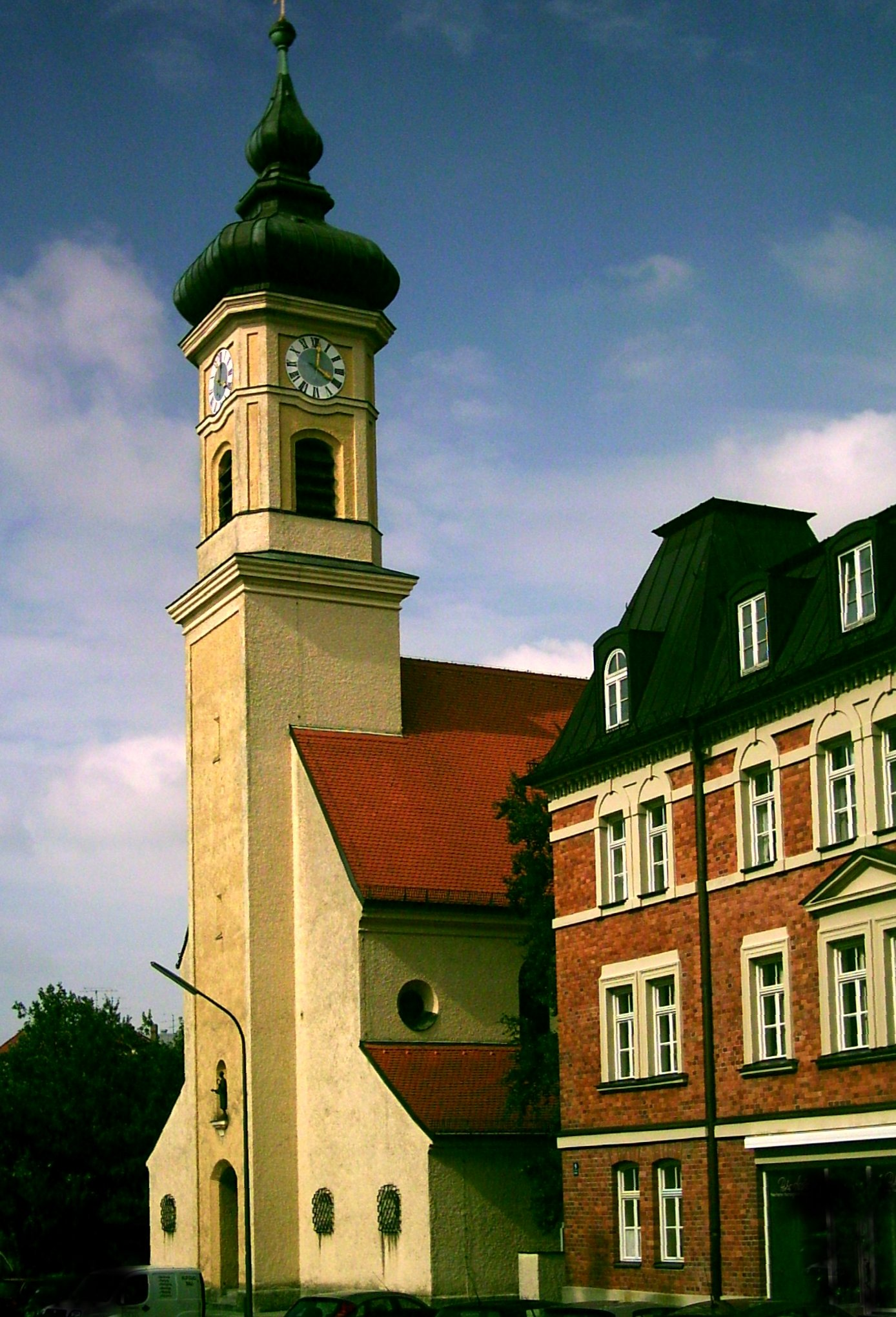 Church St. Achaz in München - Sendling.